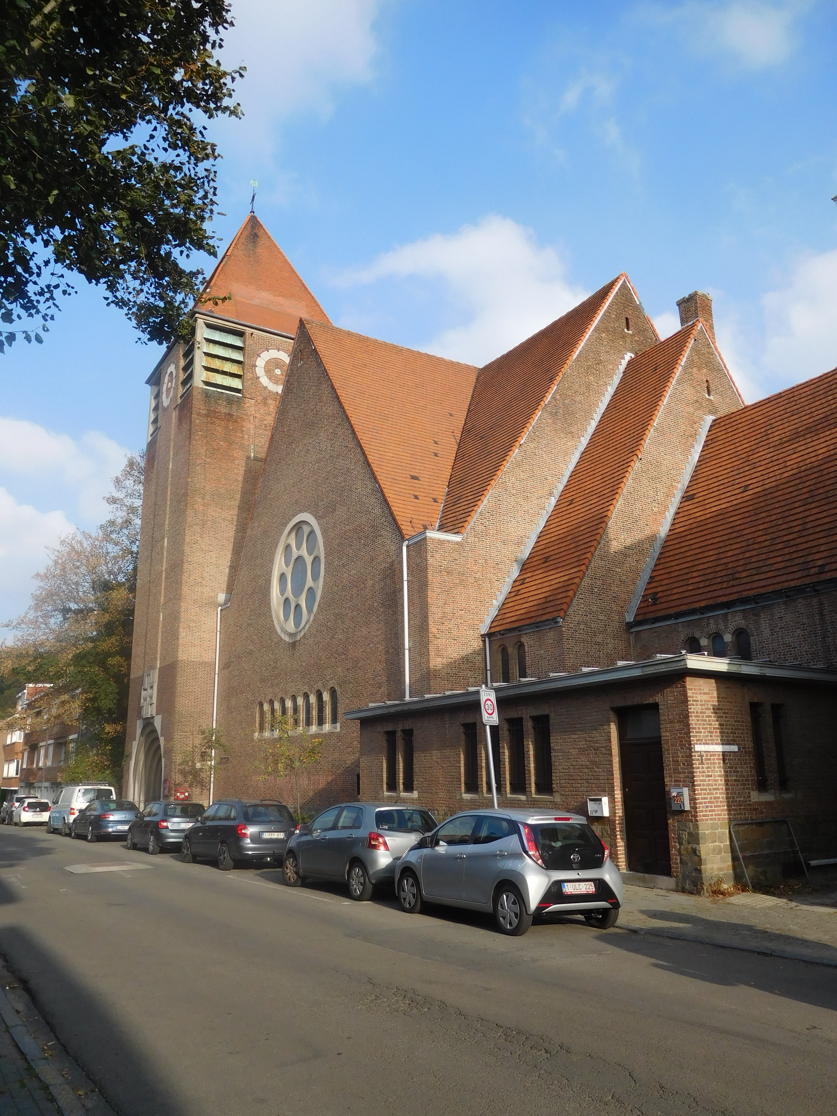 L'église du Précieux-Sang se trouve à Uccle, commune de la ville de Bruxelles